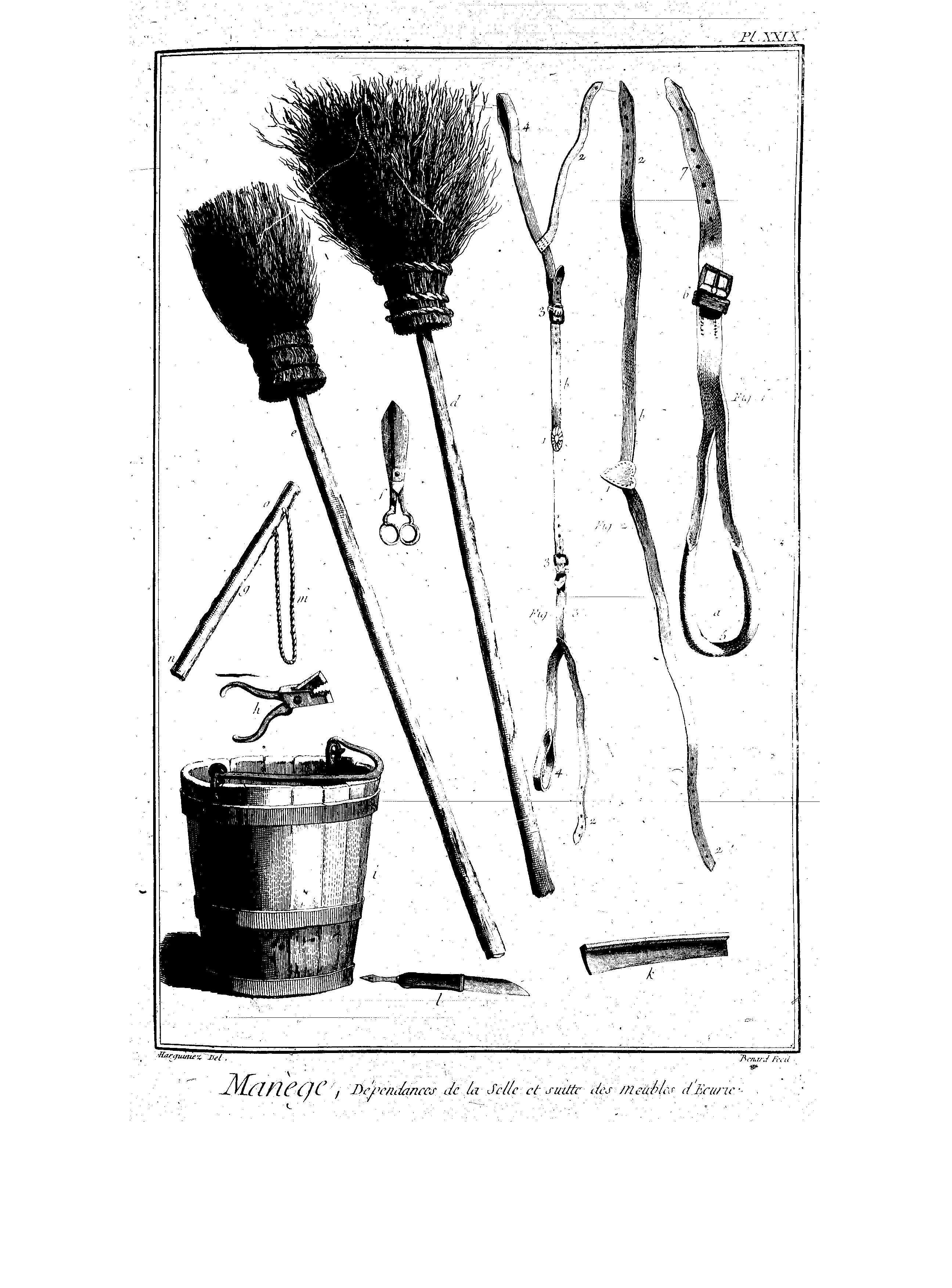 Planches de l'Encyclopédie de Diderot et d'Alembert, volume 6